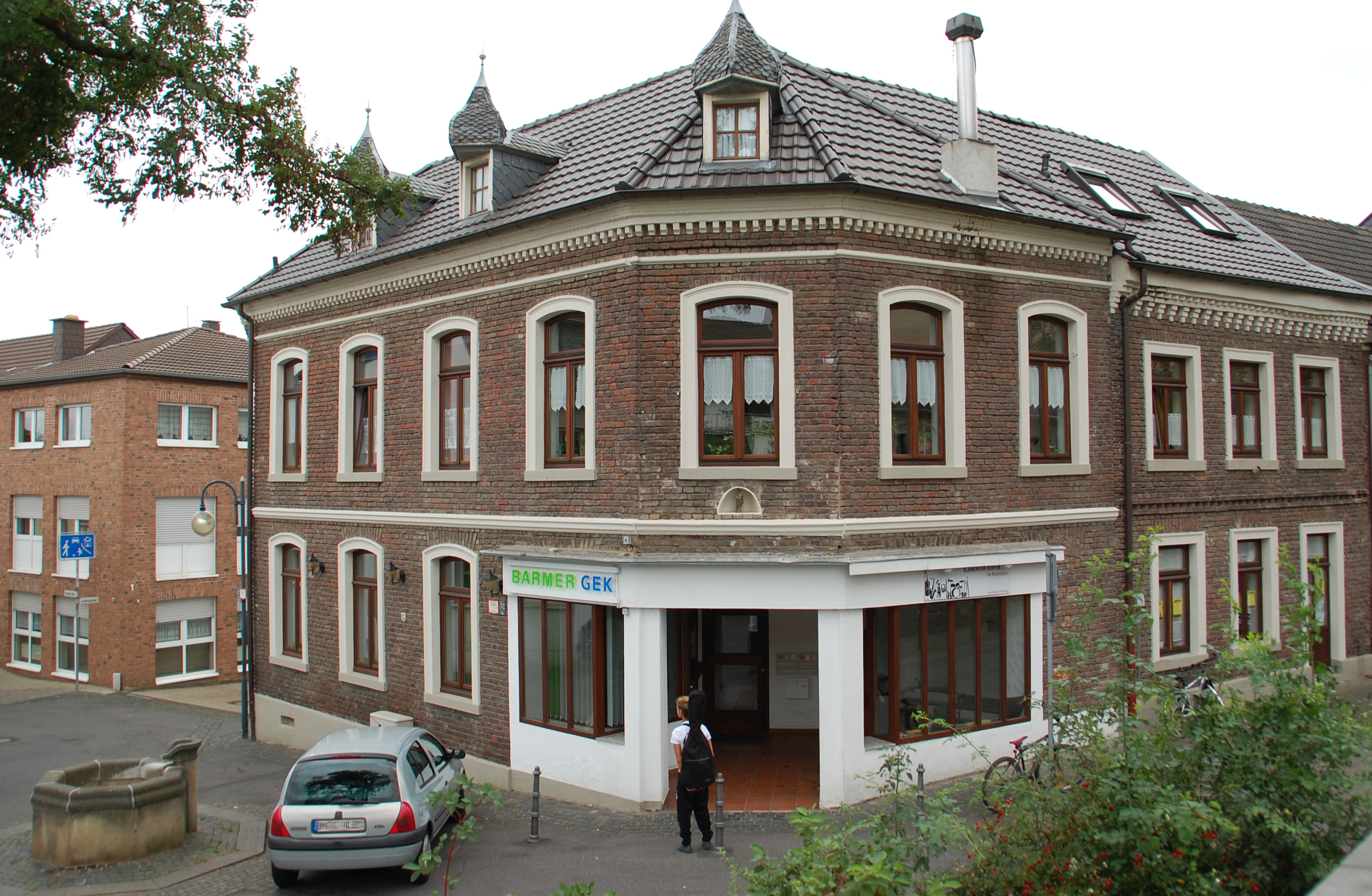 Kirchstraße 10-12 in Kerpen